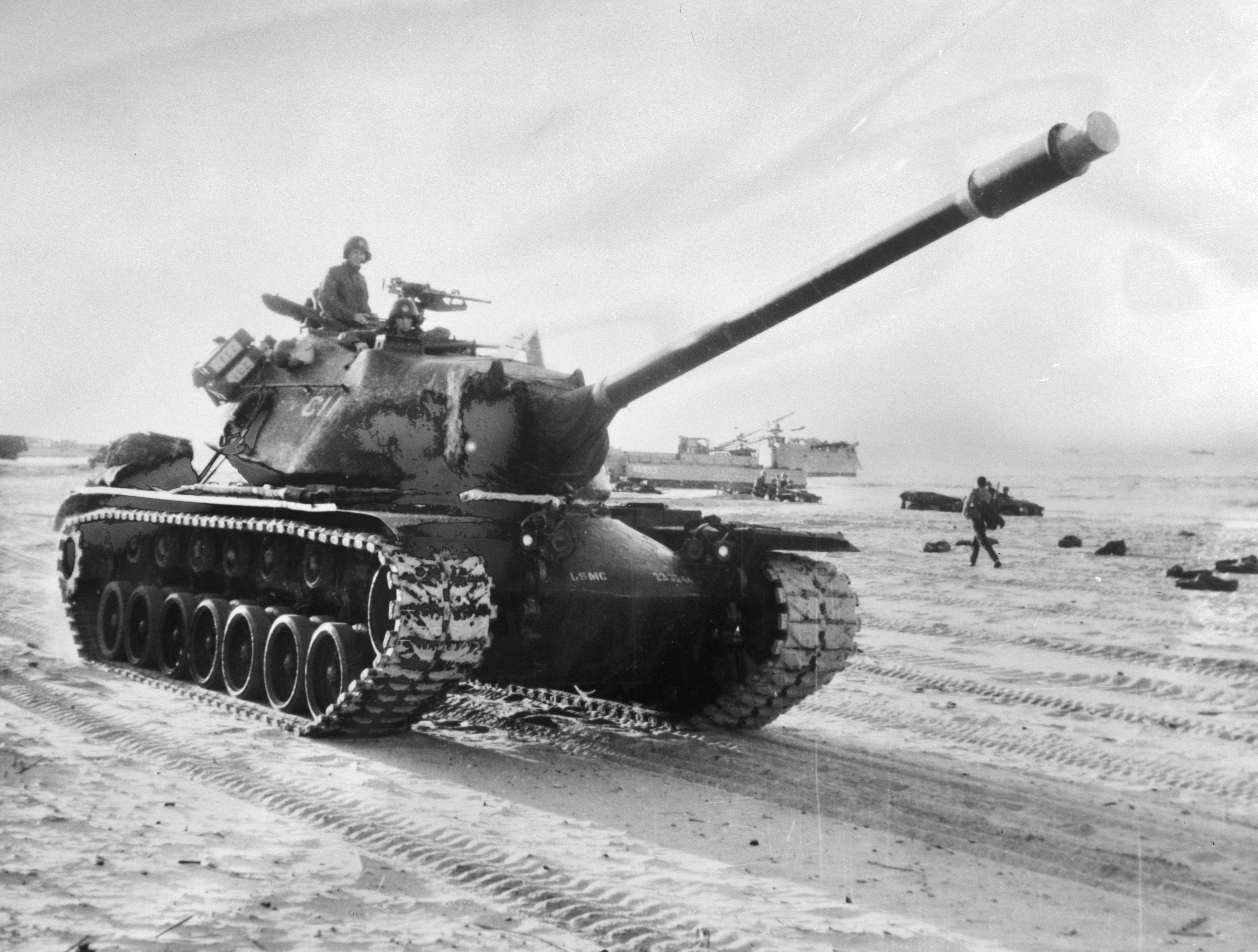 Collectie / Archief : Fotocollectie Anefo Reportage / Serie : [ onbekend ] Beschrijving : Amerikaans-Spaanse marine-oefeningen Datum : 28 oktober 1964 Trefwoorden : militairen, tanks Fotograaf : [onbekend] Auteursrechthebbende : Nationaal Archief Materiaalsoort : Negatief (zwart/wit) Nummer archiefinventaris : bekijk toegang 2.24.01.04 Bestanddeelnummer : 917-0691